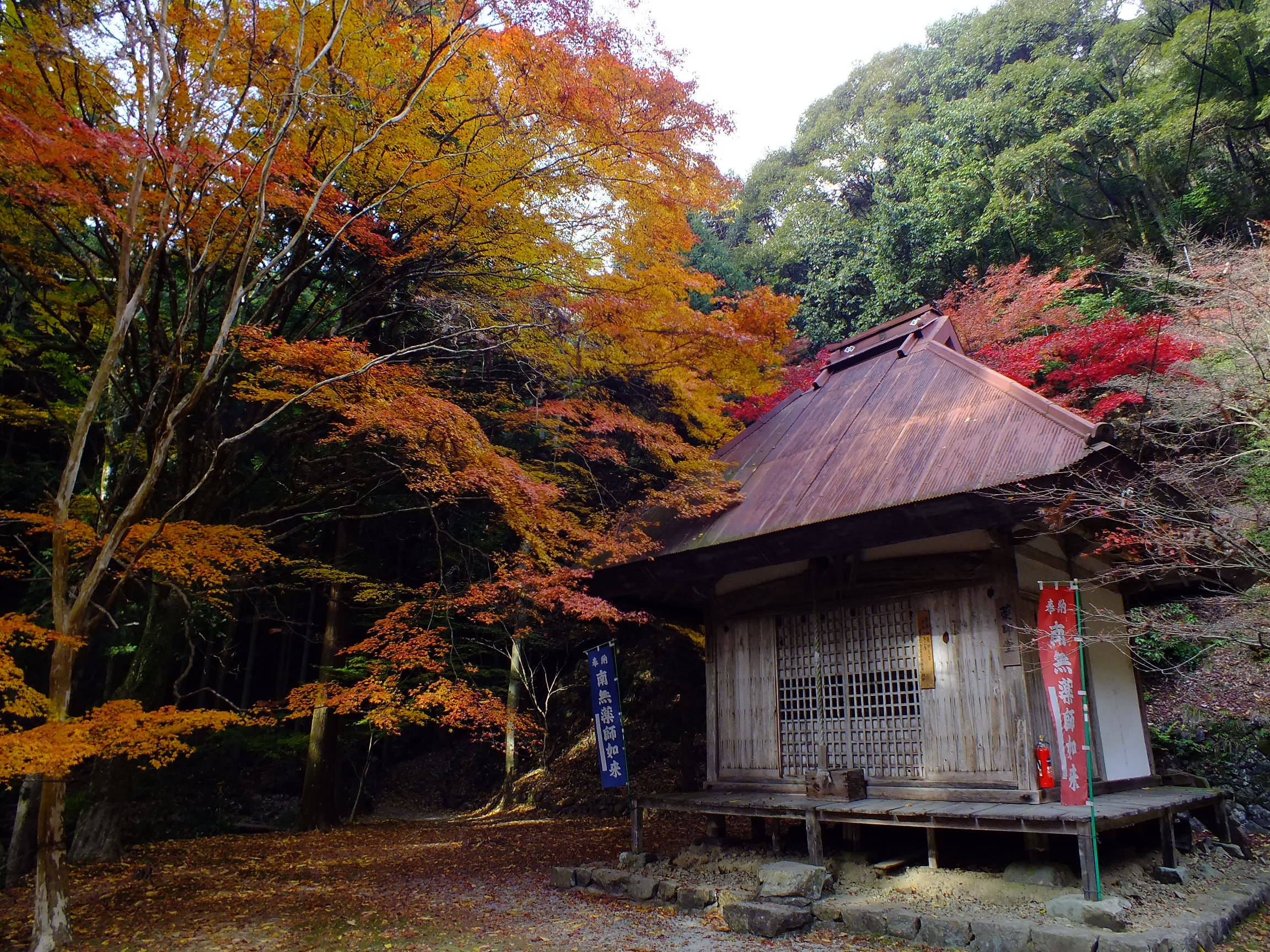 2014-11-24 Sekiganji 石龕寺